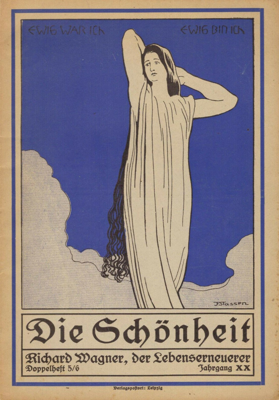 Die Schönheit. Heft 5/6, Jahrgang XX, um 1923, Berlin, Verlag der Schönheit. Umschlag von Franz Stassen. Themenheft: "Richard Wagner der Erneuerer"